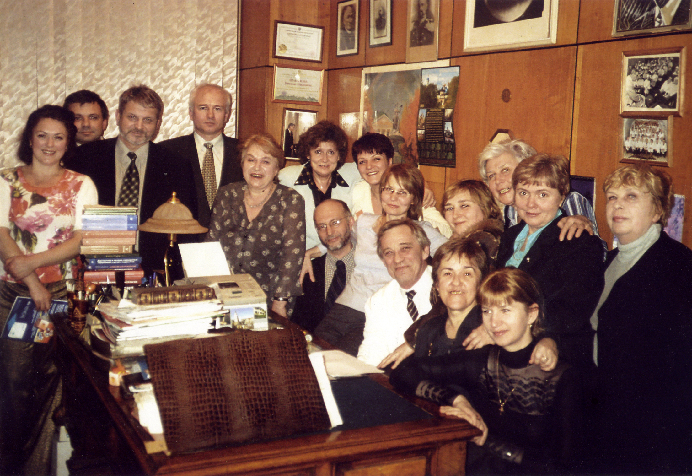 Н. П. Шабалов с сотрудниками кафедры педиатрии с курсами перинатологии ФУВ ЛПМИ